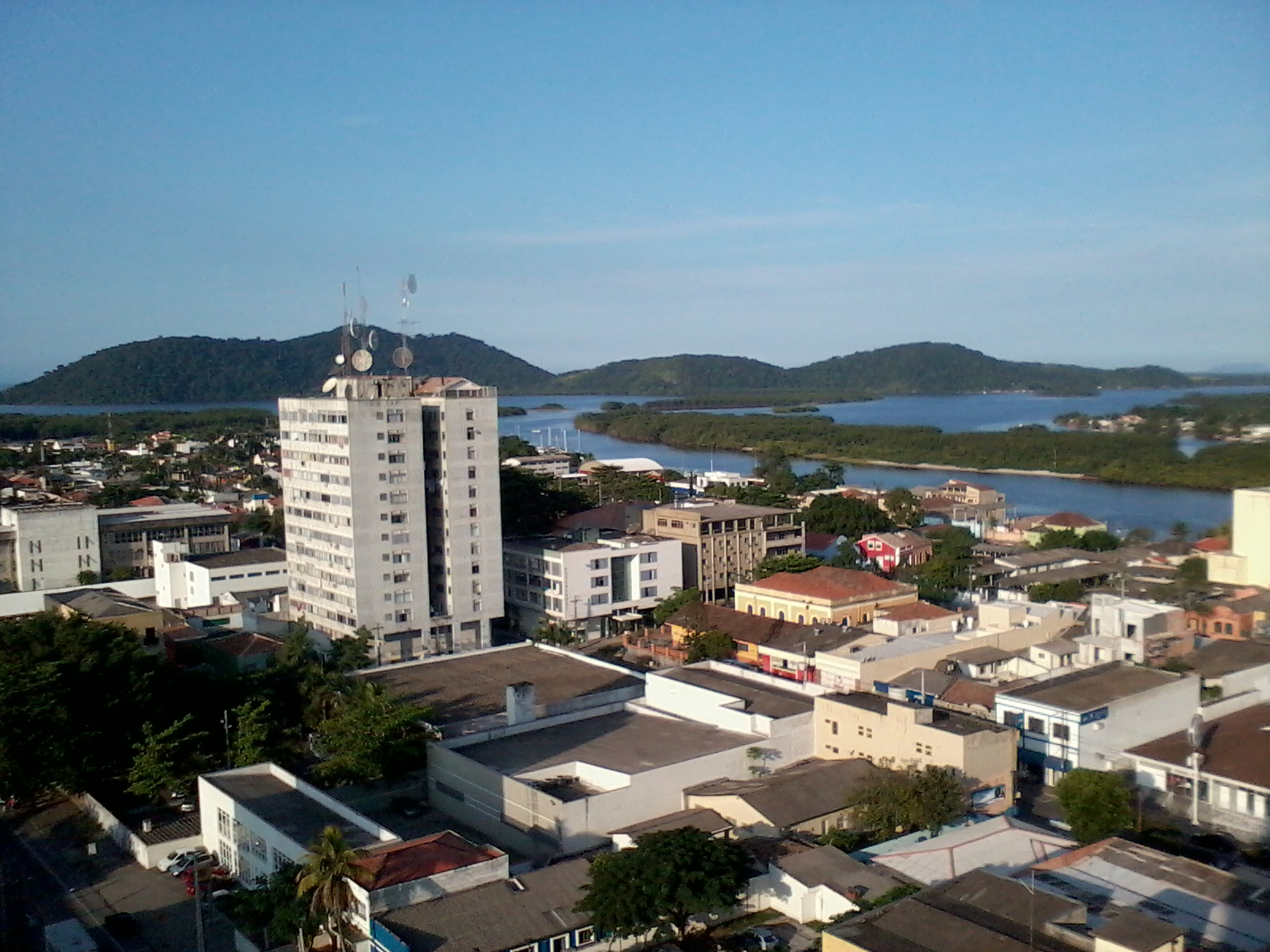 Ilha da Cotinga vista do alto do prédio Palácio do Café em Paranaguá - PR